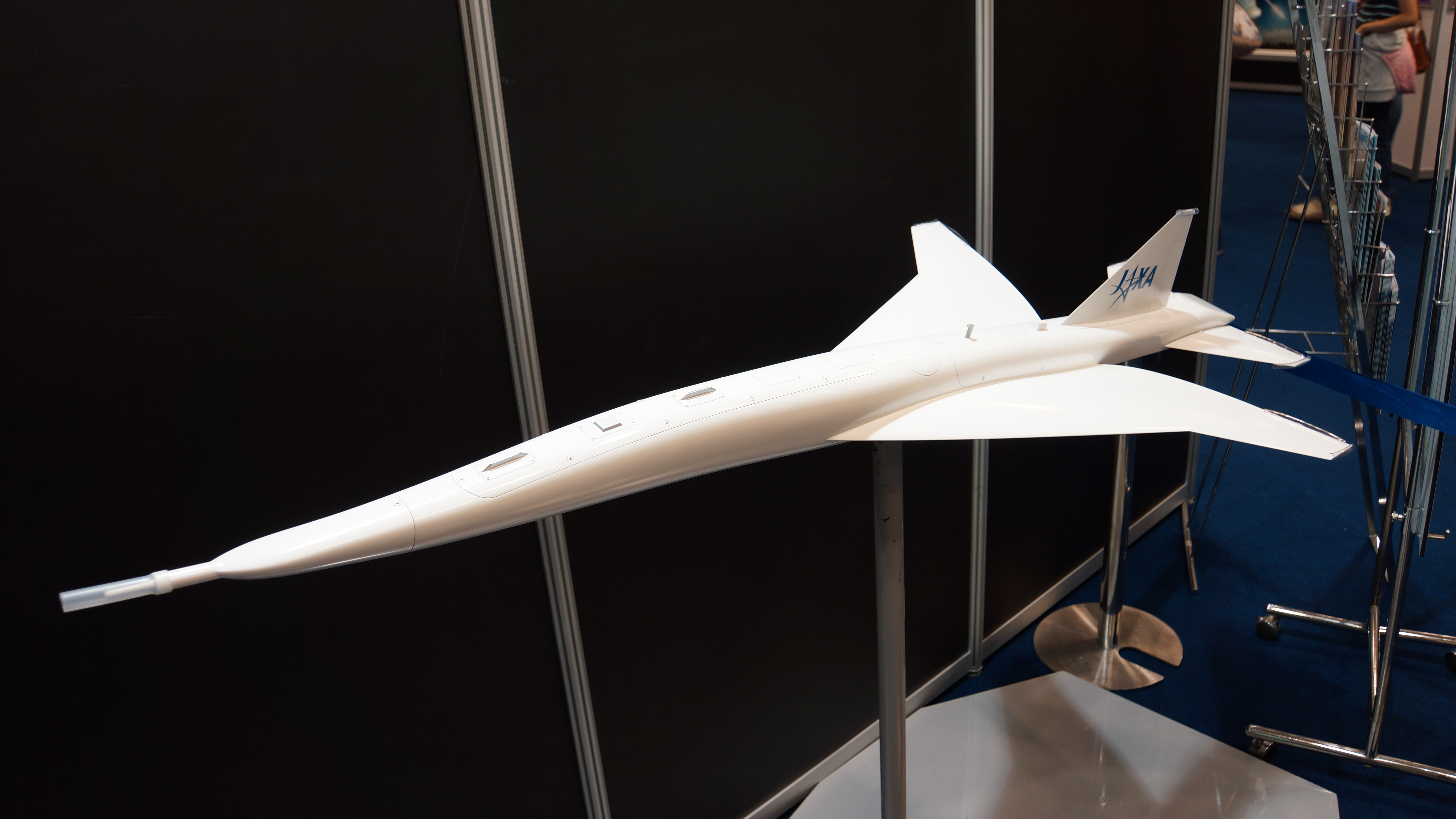 D-SEND2 超音速実験機 1/5スケール模型。 15年7月4日 神戸国際会議場でのHYOGO-KOBE 宇宙博にて。